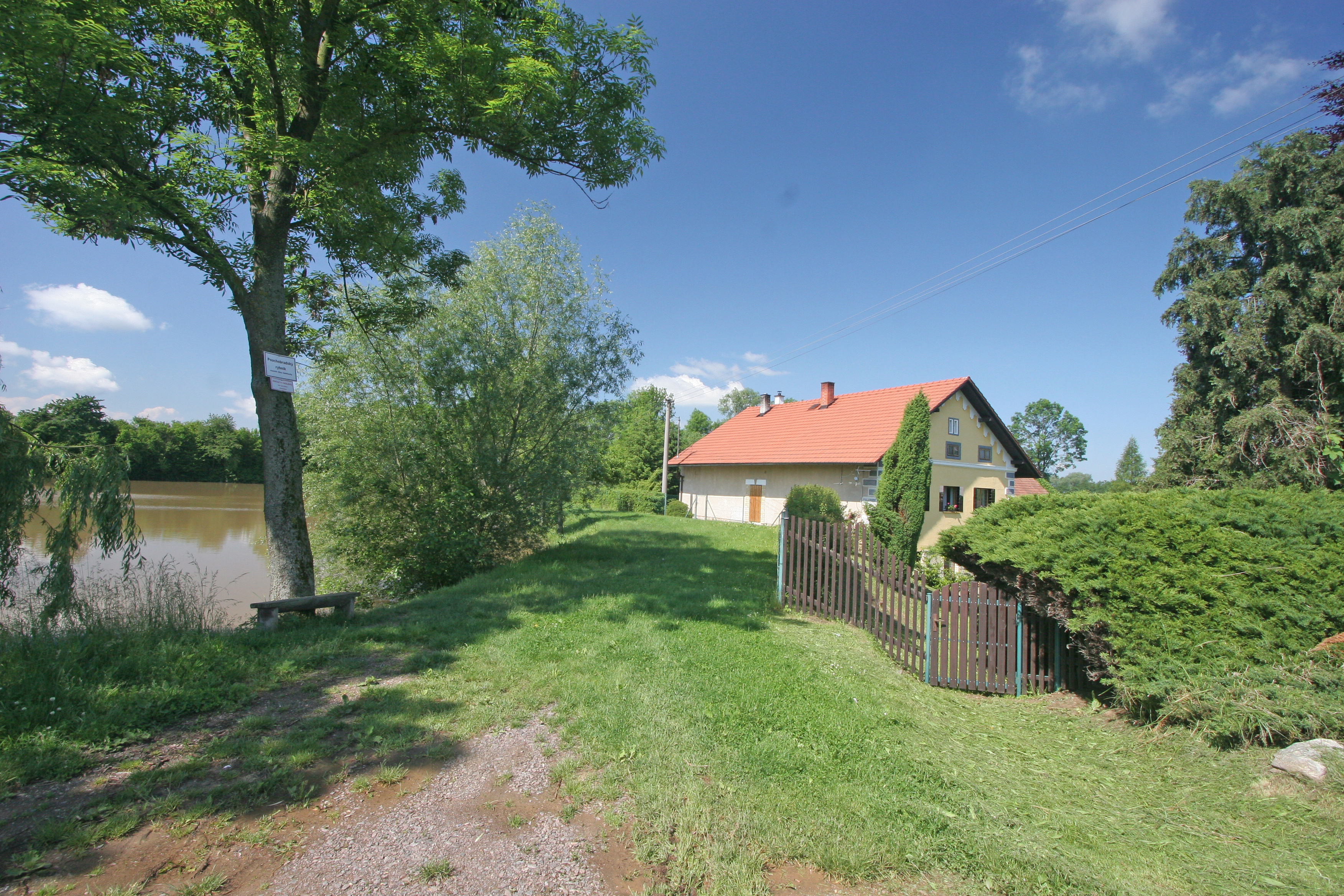 Kozojedy čp. 2